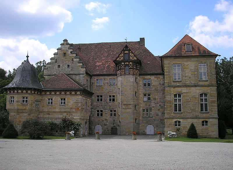 Schloss Eyrichshof bei Ebern (Unterfranken) / Eyrichshof Castle near Ebern, Lower Franconia, Germany. Ansicht von Osten / View from the east. Eigene Aufnahme, Juni 2006 / Own photo, June 2006